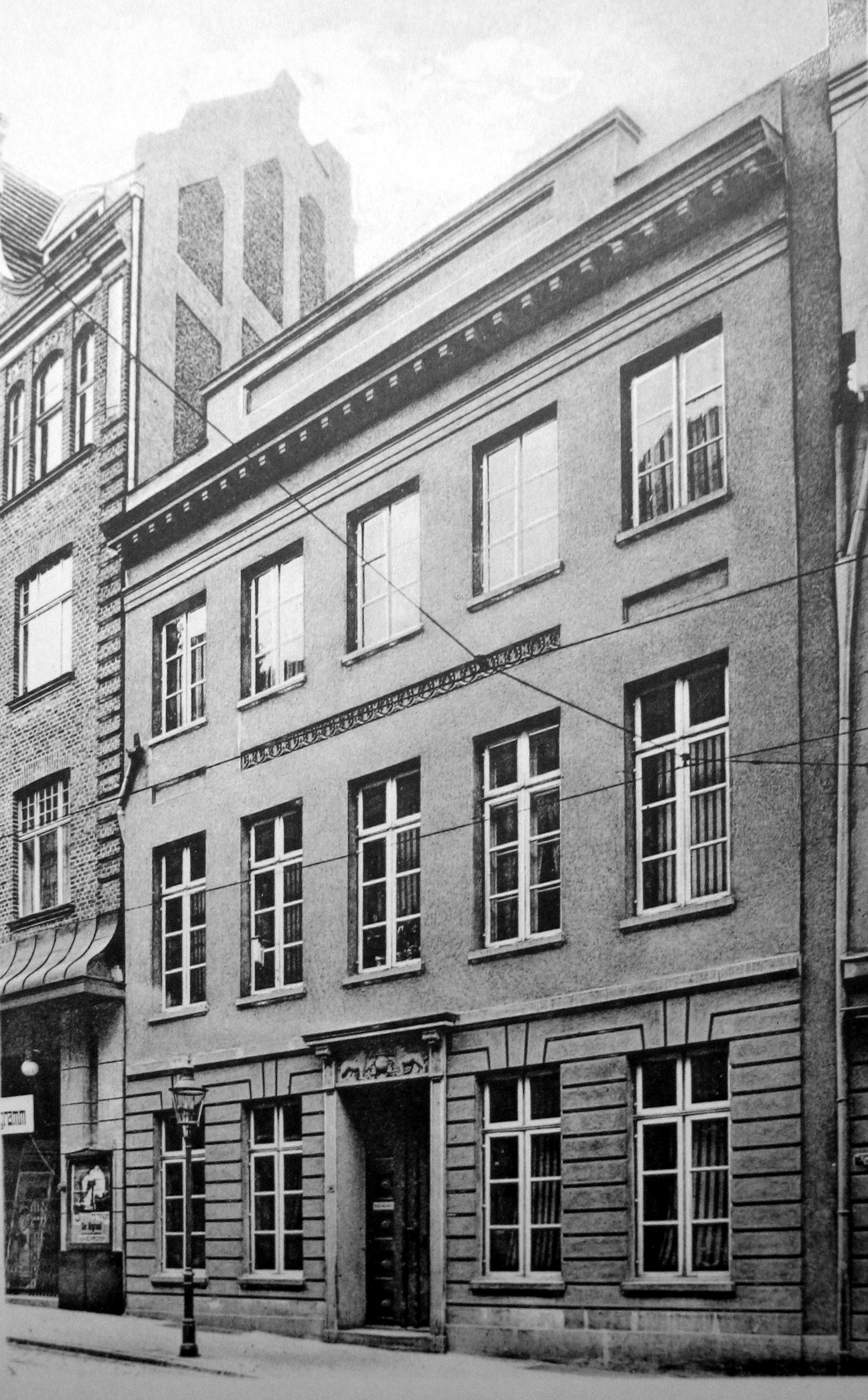 Foto des Hauses Breite Straße 50 in Lübeck, erbaut 1821 von Joseph Christian Lillie. Foto von Johannes Nöhring (1834-1913)